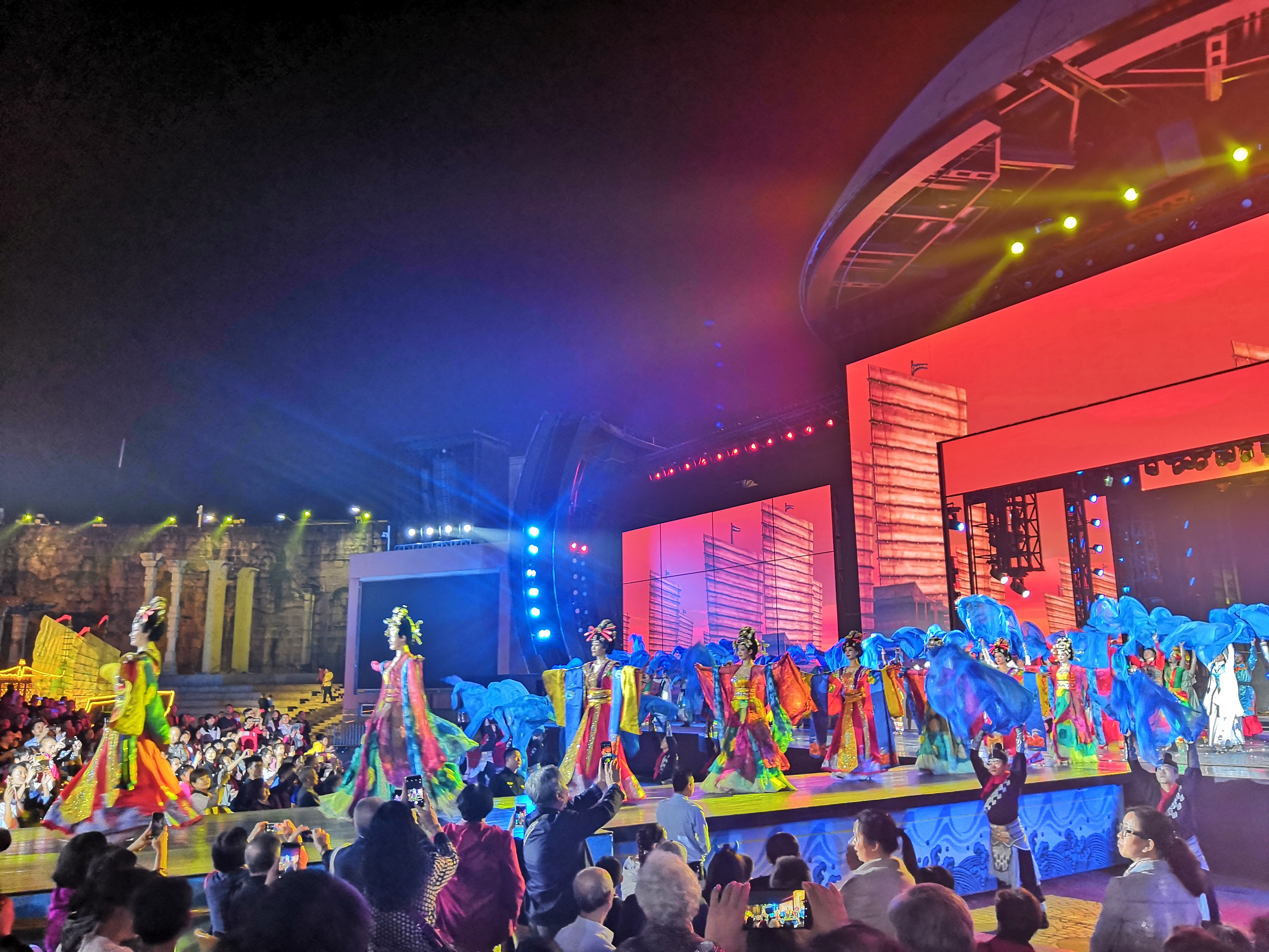 中文（中国大陆）: 深圳 世界之窗